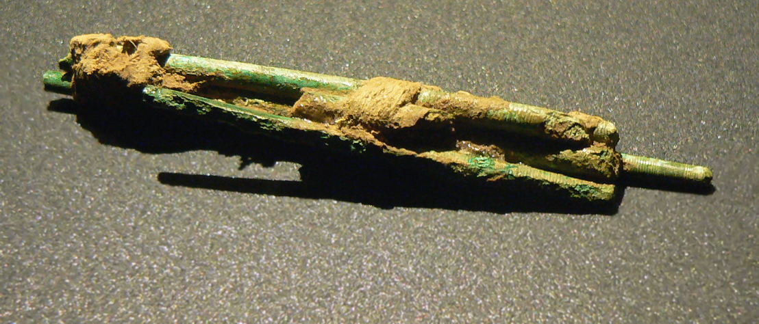 Bronzenadeln mit Fasern, Aufnahme bei der Pressekonferenz zur Eröffnung der Ausstellung im Niedersächsischen Landesmuseum Hannover zur Schau Im Goldenen Schnitt - Niedersachsens längste Ausgrabung